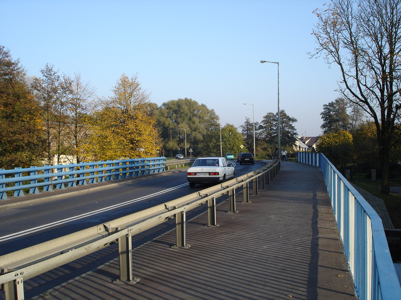 Beltway in Stargard Szczeciński